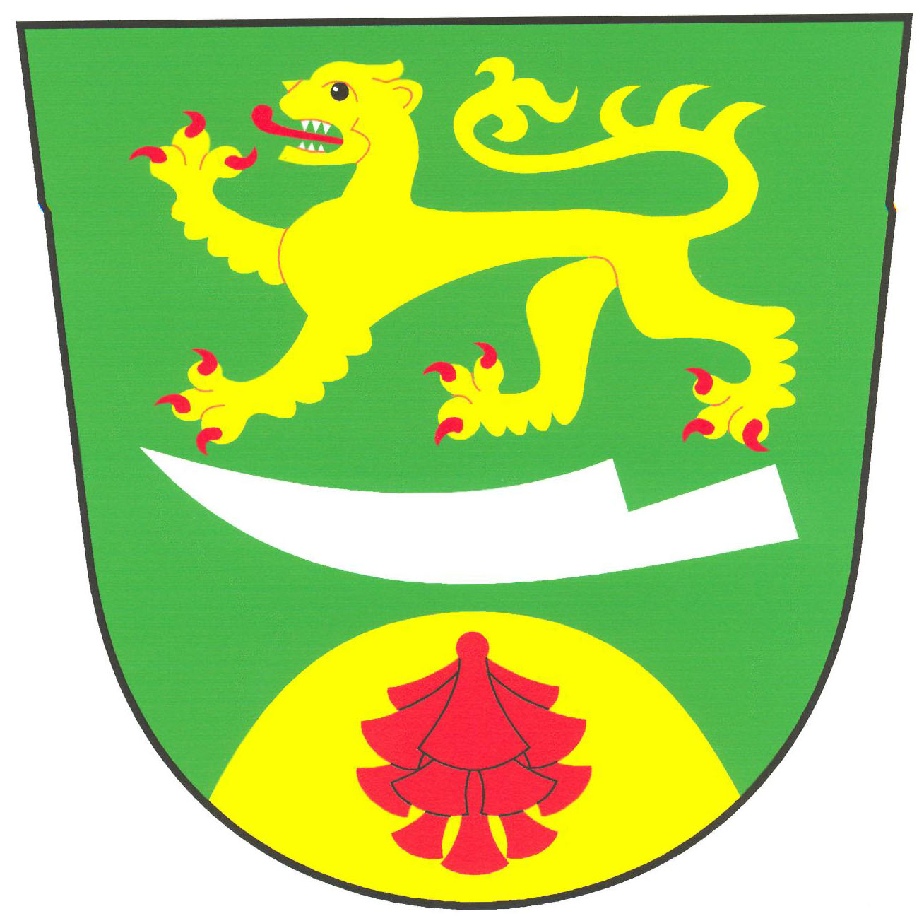 Znak obce Záborná